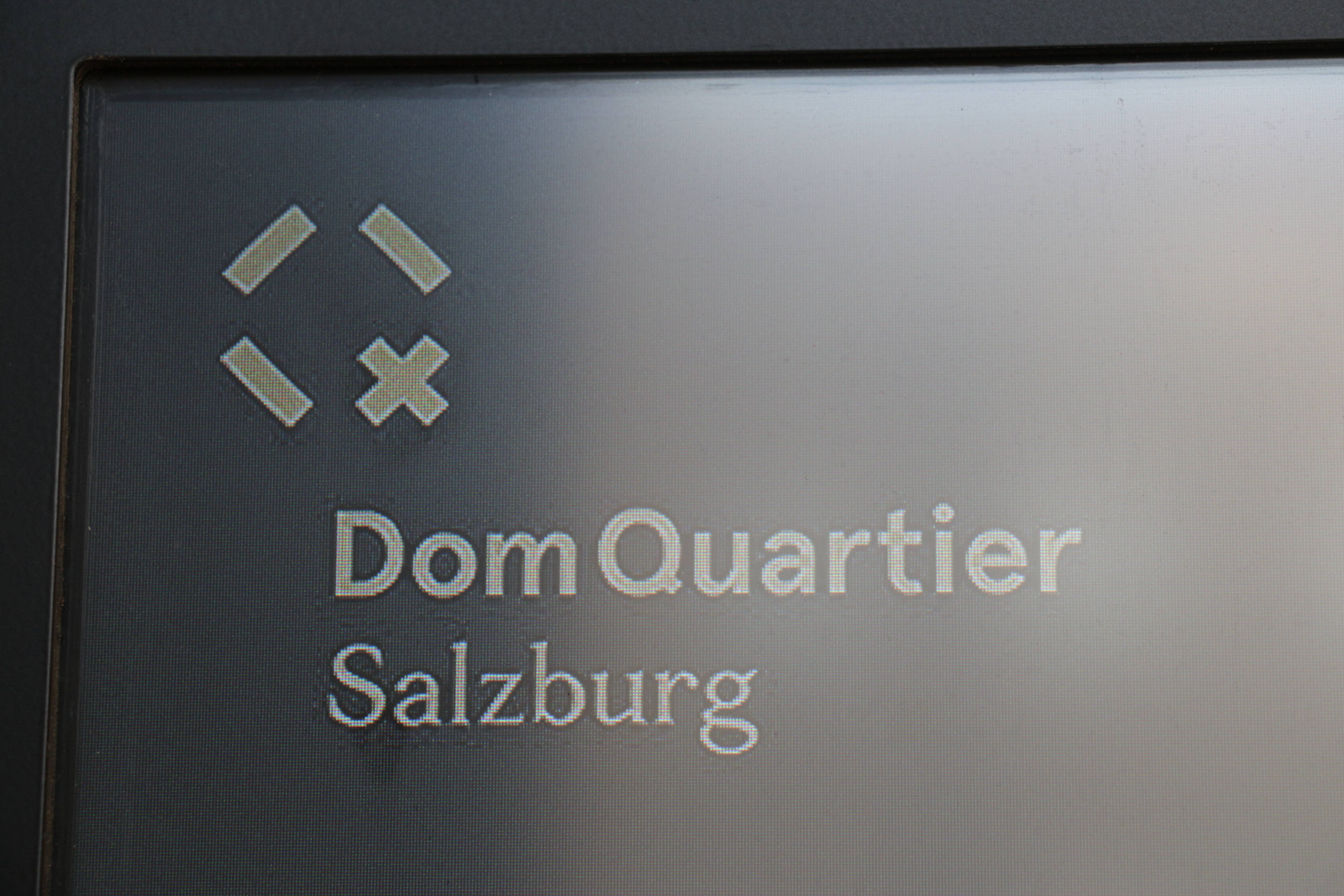 Die Wort-Bildmarke des DomQuartiers im Eingangsbereich der Salzburger Residenz